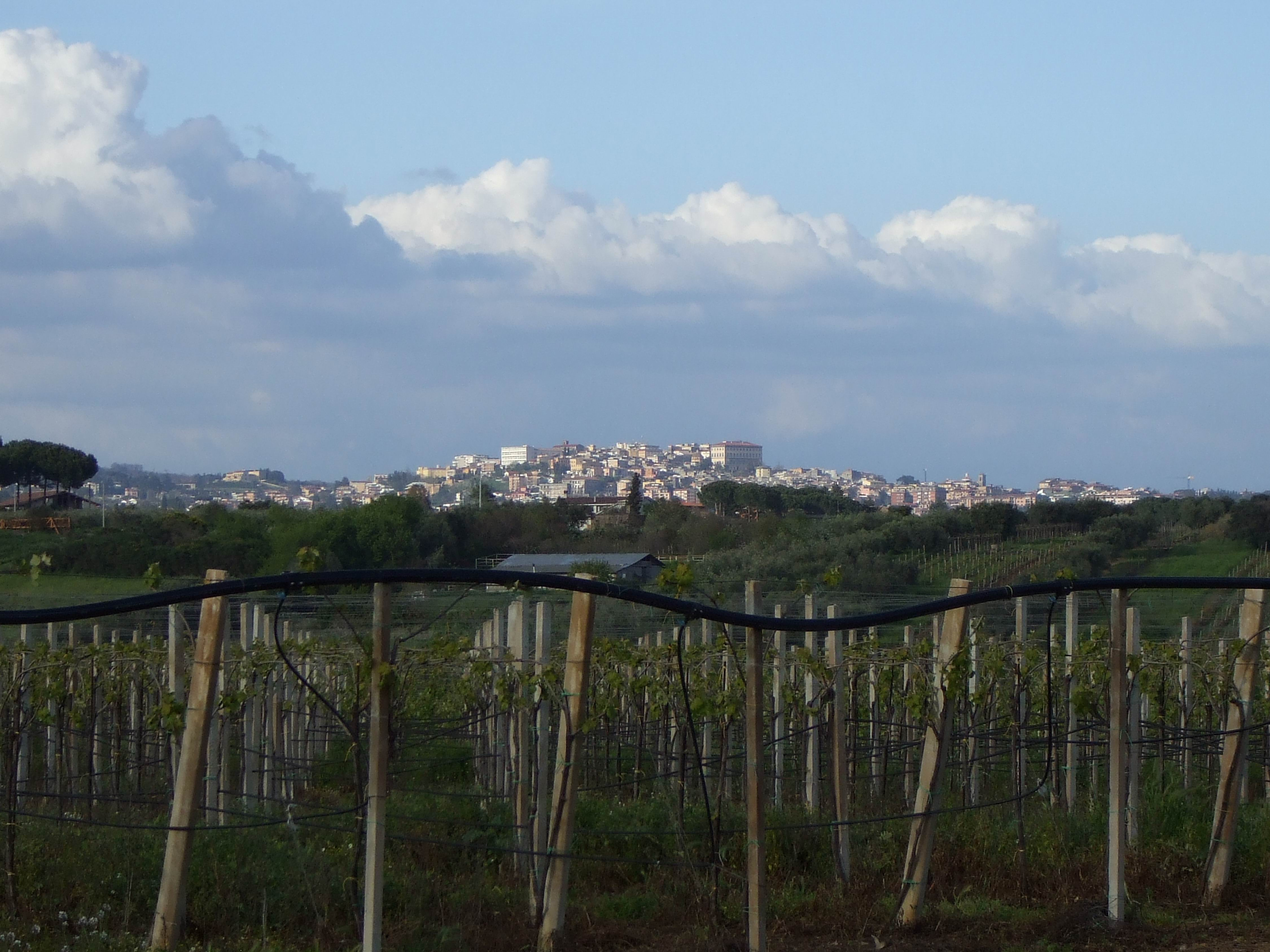 Velletri panorama